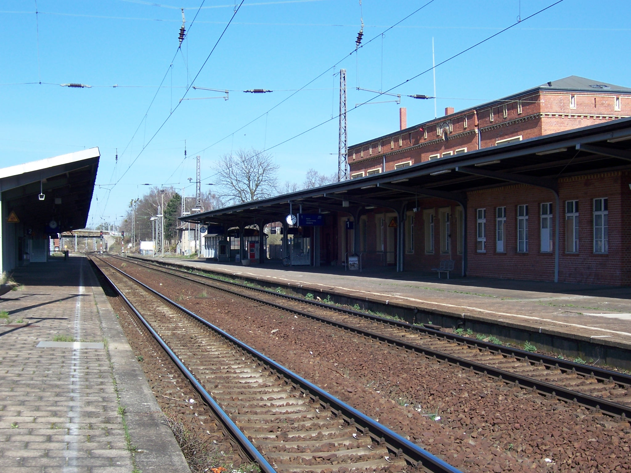 Bahnhof Roßlau (Elbe), Bahnsteige und Empfangsgebäude